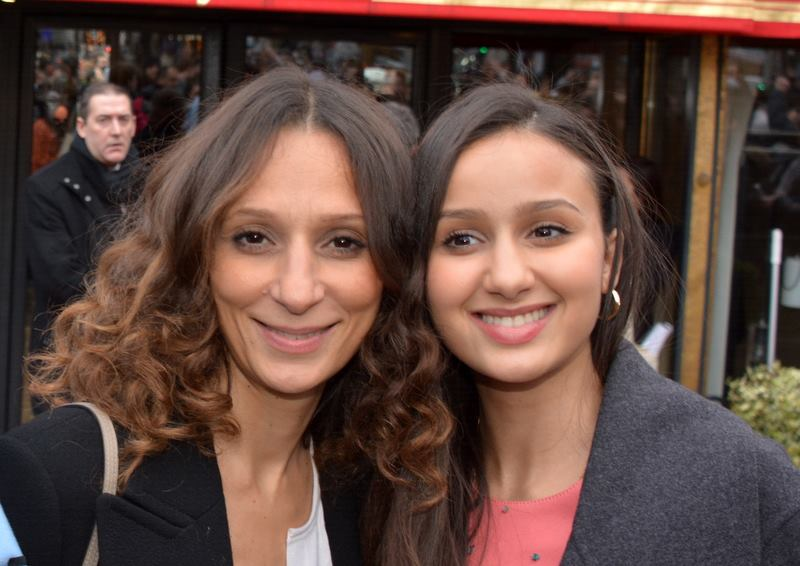 Houda Benyamina et Oulaya Amamra au déjeuner des nommés des César du cinéma.